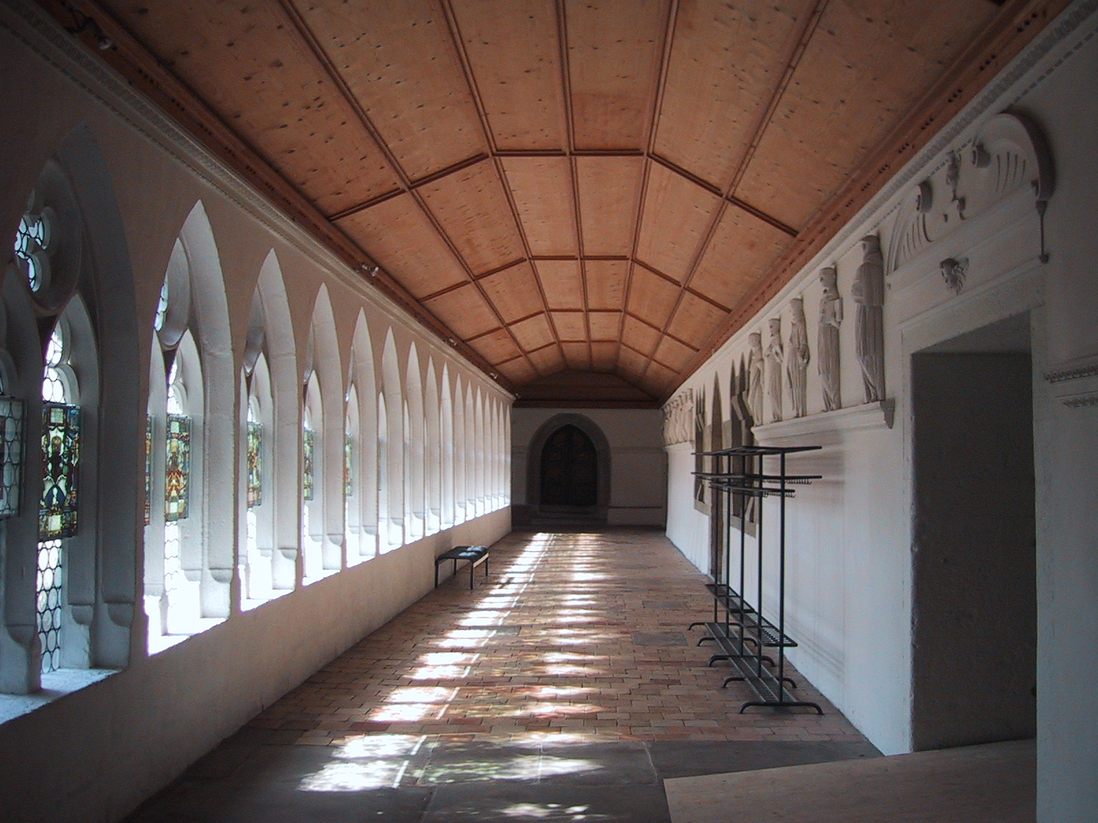 Ehemaliges Zisterzienserkloster Wettingen, Kreuzgang